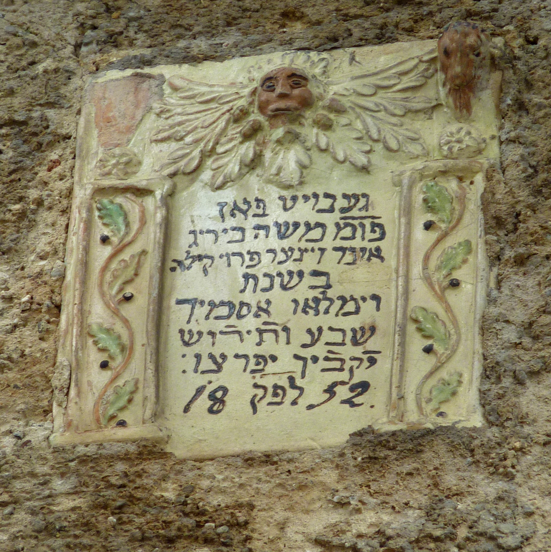 Alte Synagoge in Flehingen, Inschrift: "Gebaut von Gemeindevorsteher Mosche Bierig und seiner Frau Keile. 'Es werden deine Scheunen voll und deine Kelter von Wein überlaufen' 1852". Der erste Satz ist deutsch, aber in hebräischen Buchstaben geschrieben, außer dem Titel für "Gemeindevorsteher". Der zweite Satz ist hebräisches Zitat aus Sprüche 3,10. (übernommen von [1], Dank an Alemannia Judaica)